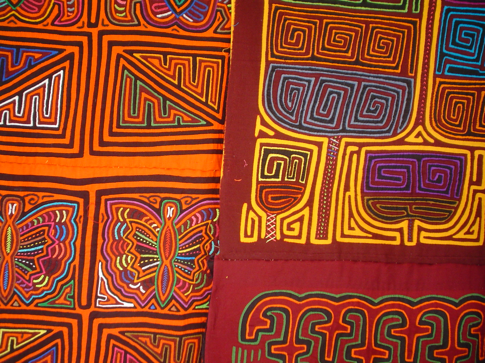 Molas hechas por kunas (raza indígena de Panamá)